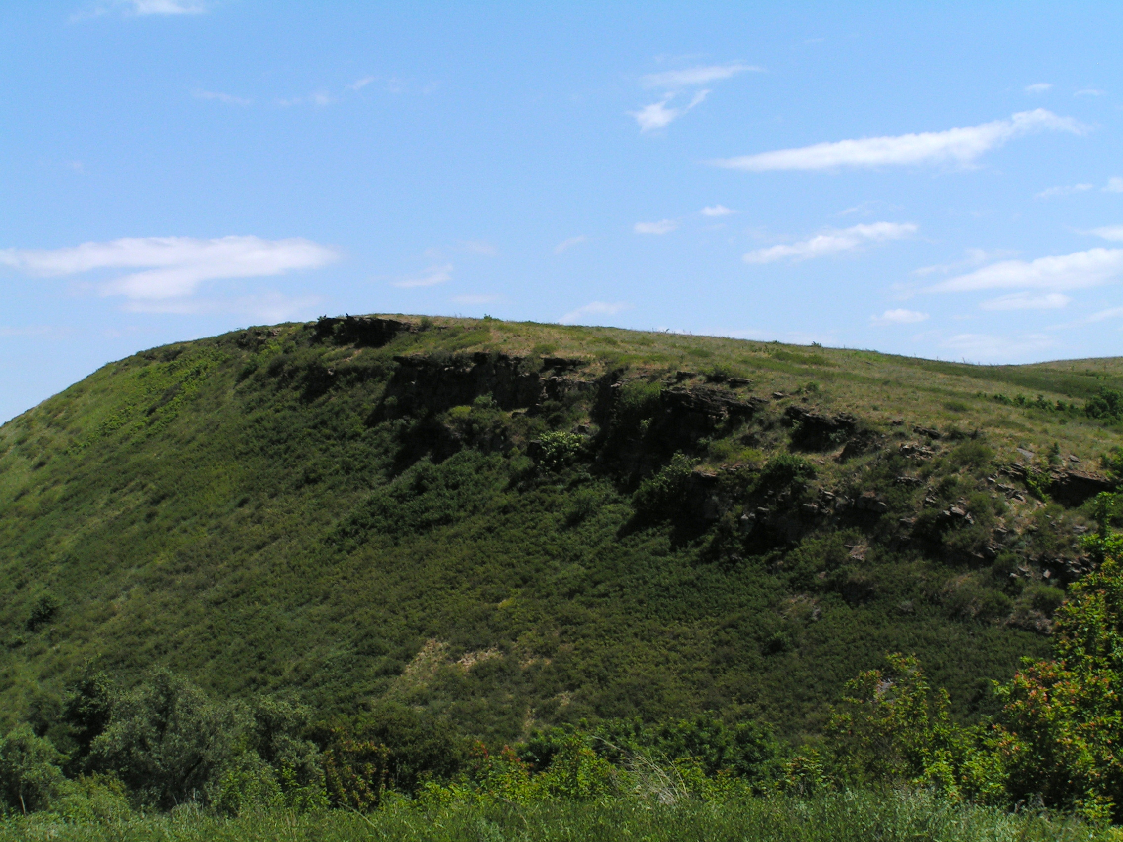 Відділення «Провальський степ», Свердловський район, с. Провалля